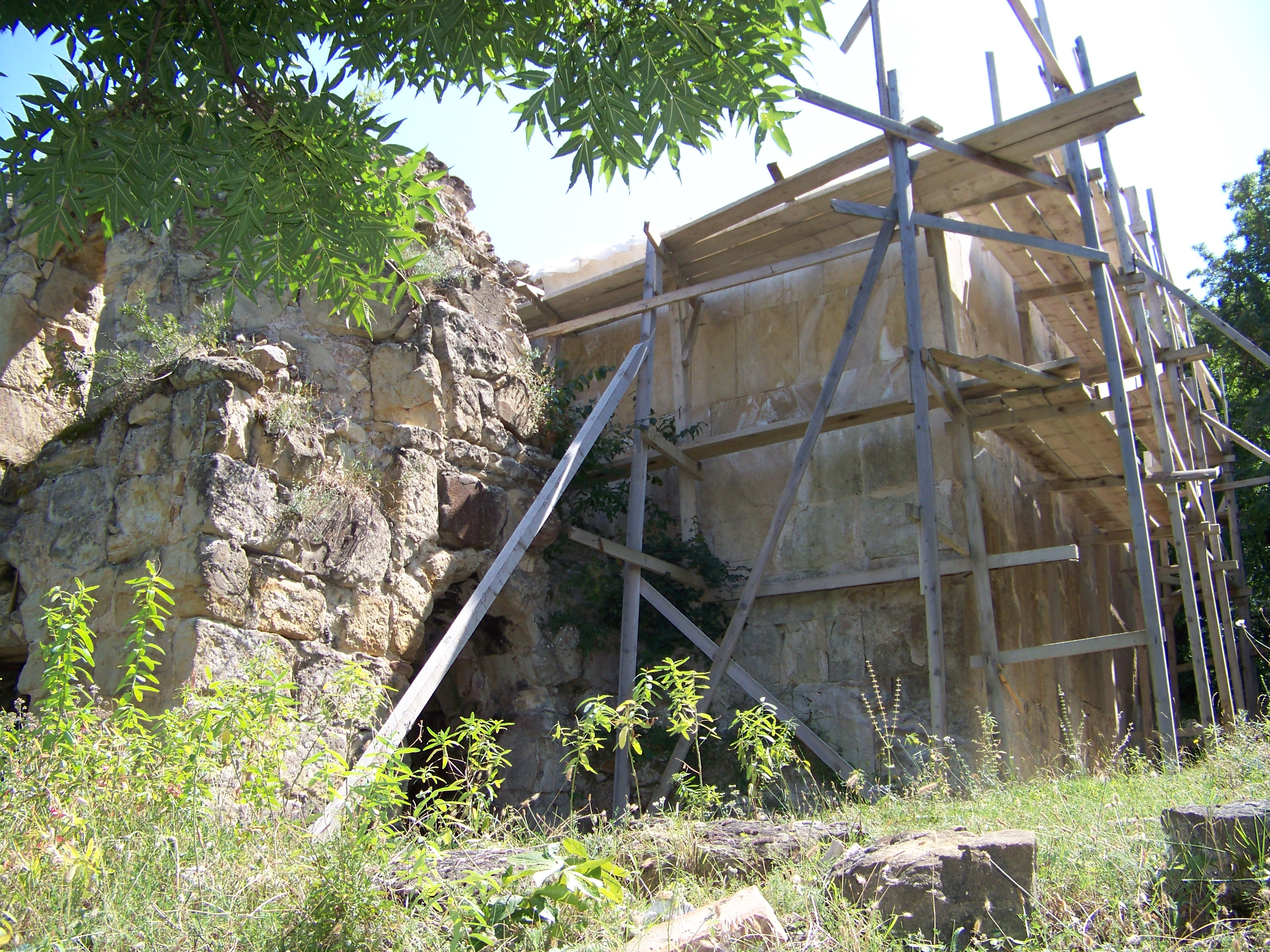 ნაბახტევის ღვთისმშობლის ეკლესია